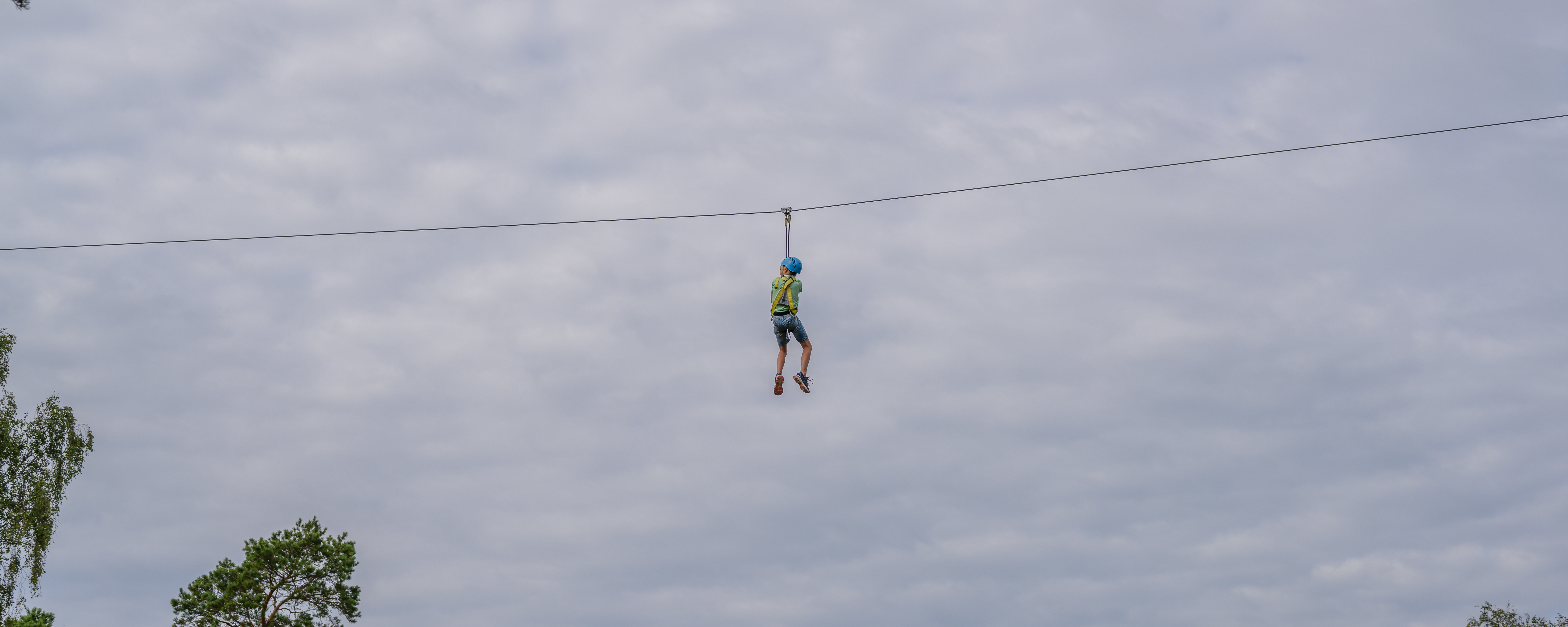 Arholma, Sweden, August 2019